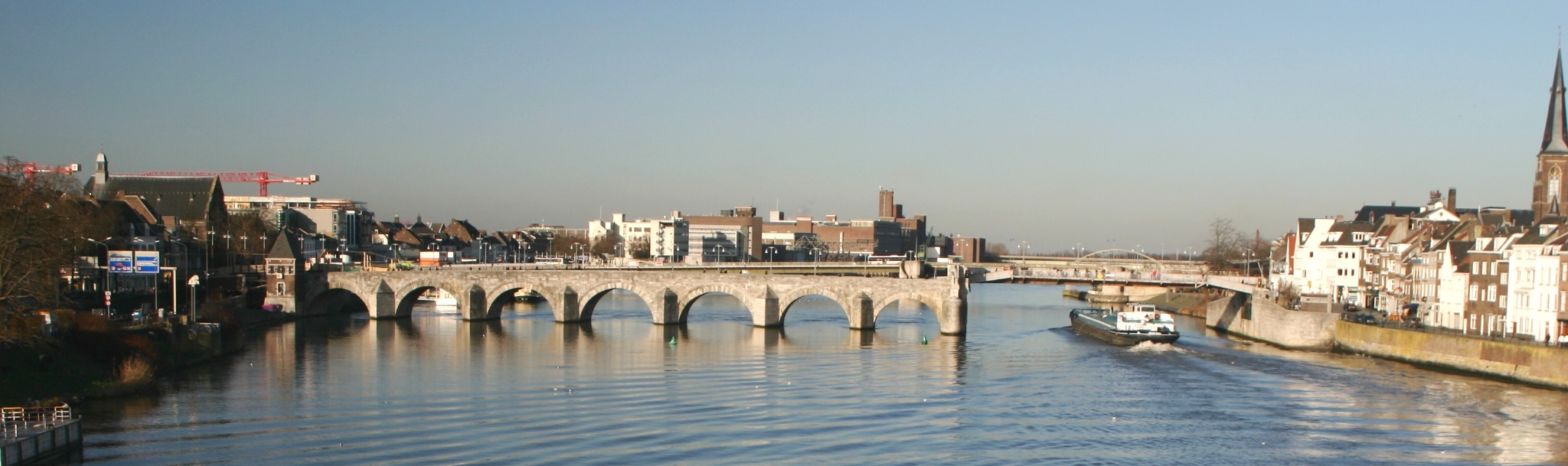 Sint Servaasbrug zu Maastricht iwwer d'Meuse.